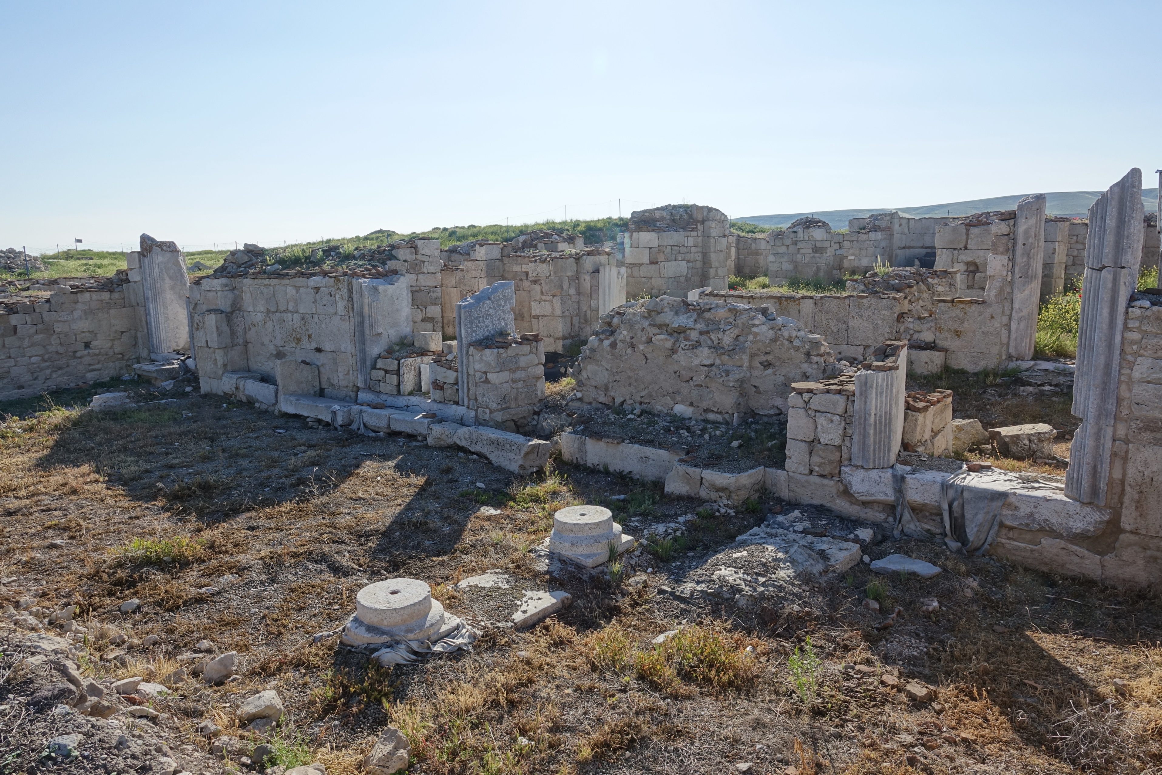 Blick auf ausgegrabene Gebäude der noch bis in das 12. Jahrhundert bewohnten Unterstadt